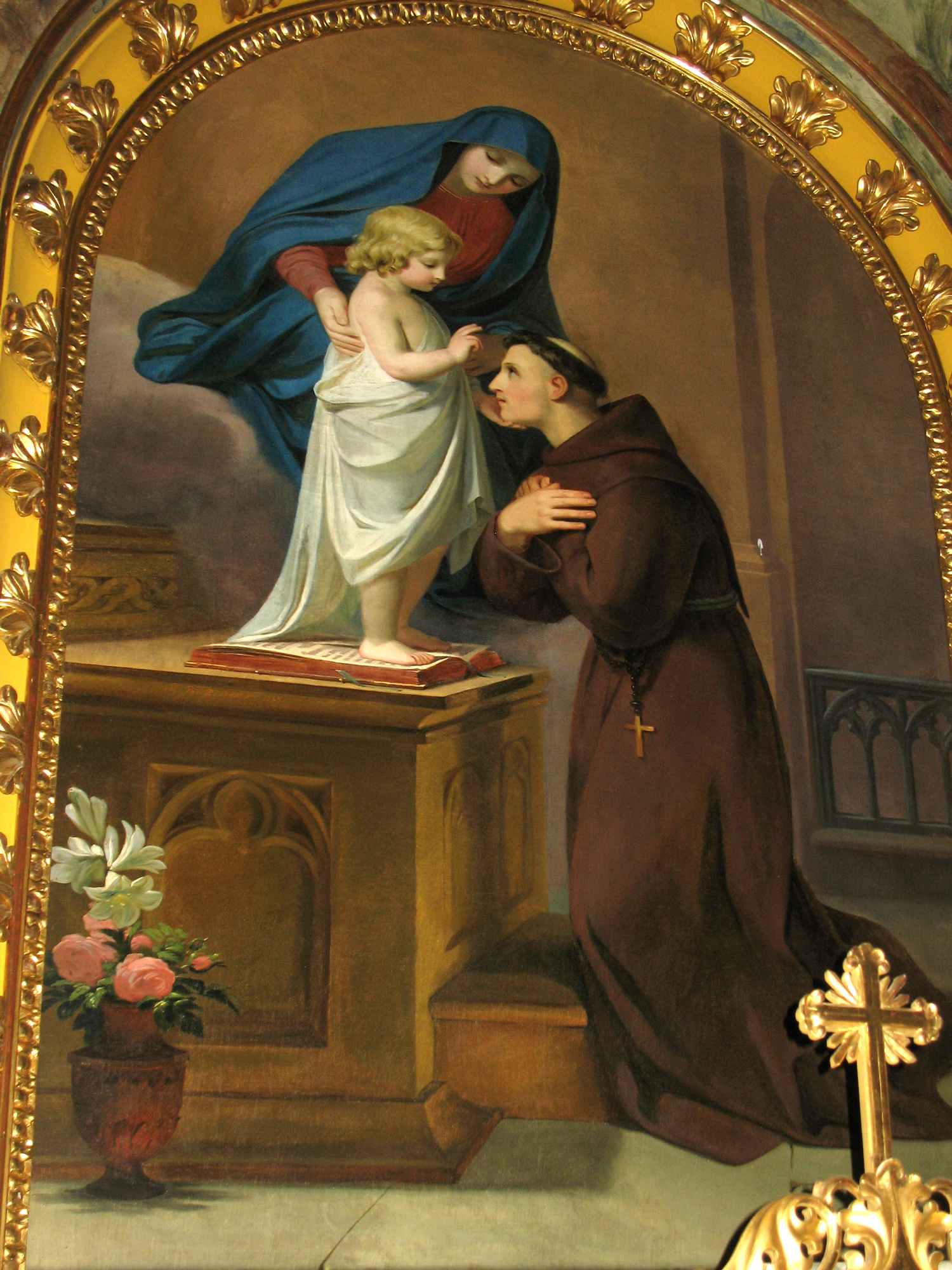 Main Altar of Saint Antony church in St. Ulrich in Gröden - Ortisei Val Gardena Italy. painter Melchior Paul von Deschwanden (* 10. Januar 1811 in Stans; † 25. Februar 1881 in Stans).